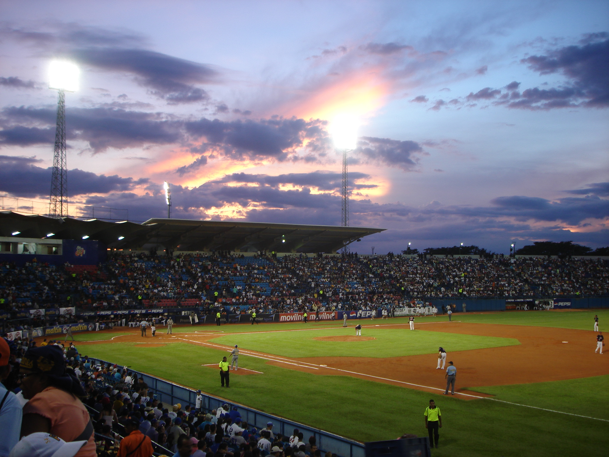 Desde tribuna lateral derecha.